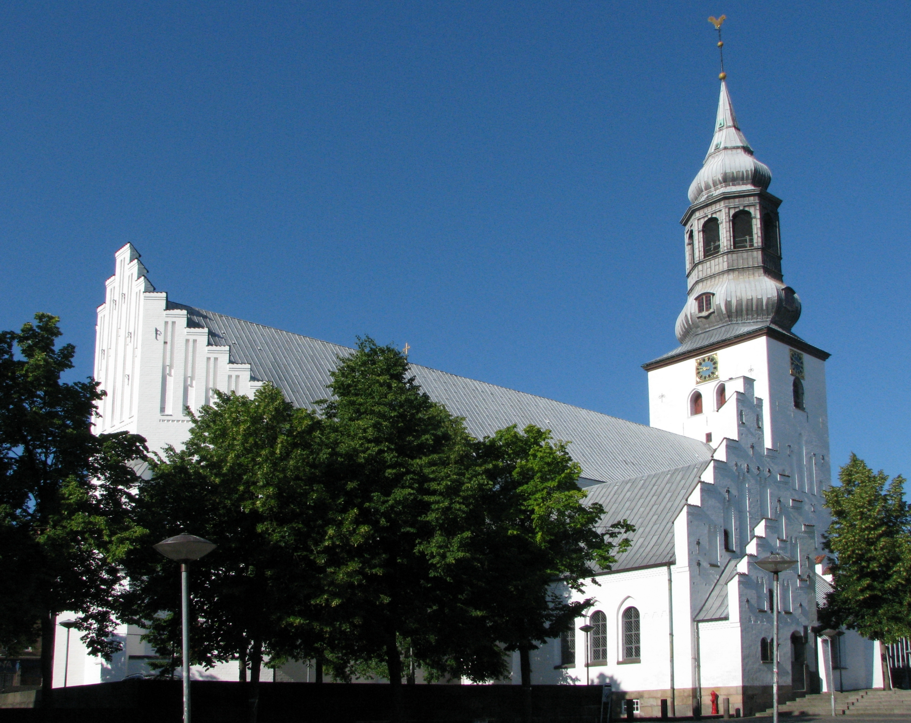 Aalborg Danmark Sct. Budolfi Kirke er Aalborgs domkirke - Foto 2010 Wolfgang Pehlemann Steinberg Ostsee IMG_6662